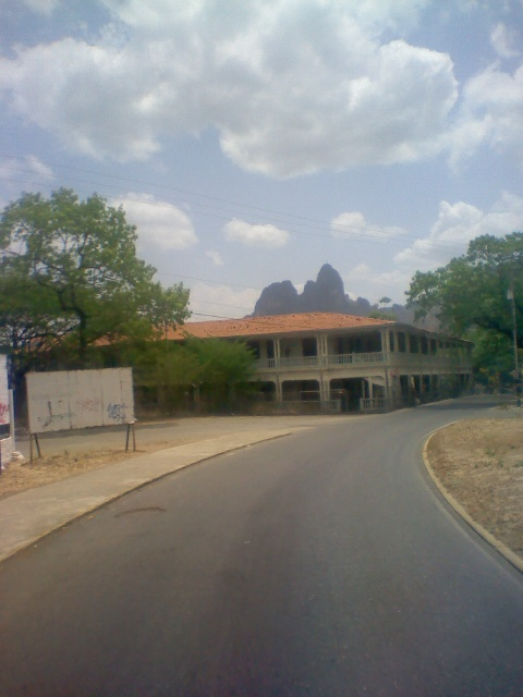 Vista el Antiguo Hotel Termal y los Morros de San Juan al Fondo